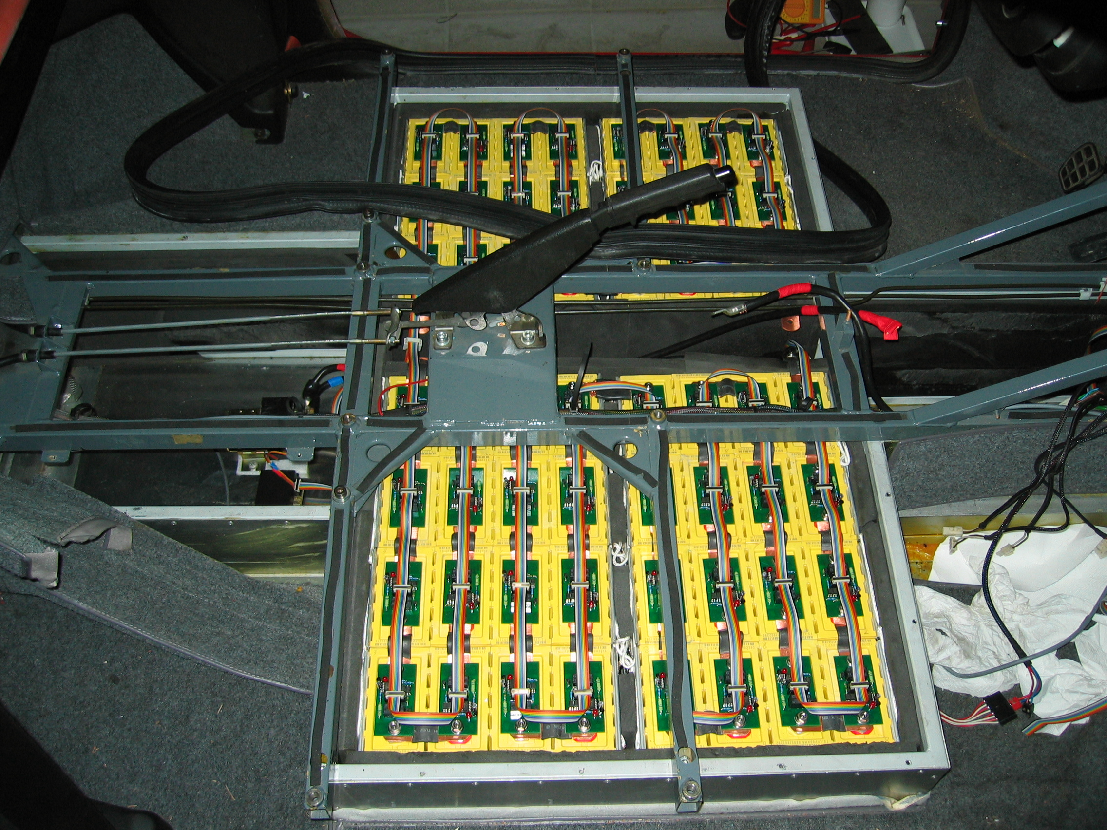 Akkuwanne Elektroautomobil Hotzenblitz, von original 14x12V/60Ah Bleiakku umgerüstet auf 56Stck. Zellen ThunderSky LPF60AH, Einzelzellen-BMS mit Busstruktur Kapazität nominal 10,7kWh, Reichweite maximal 90-100km